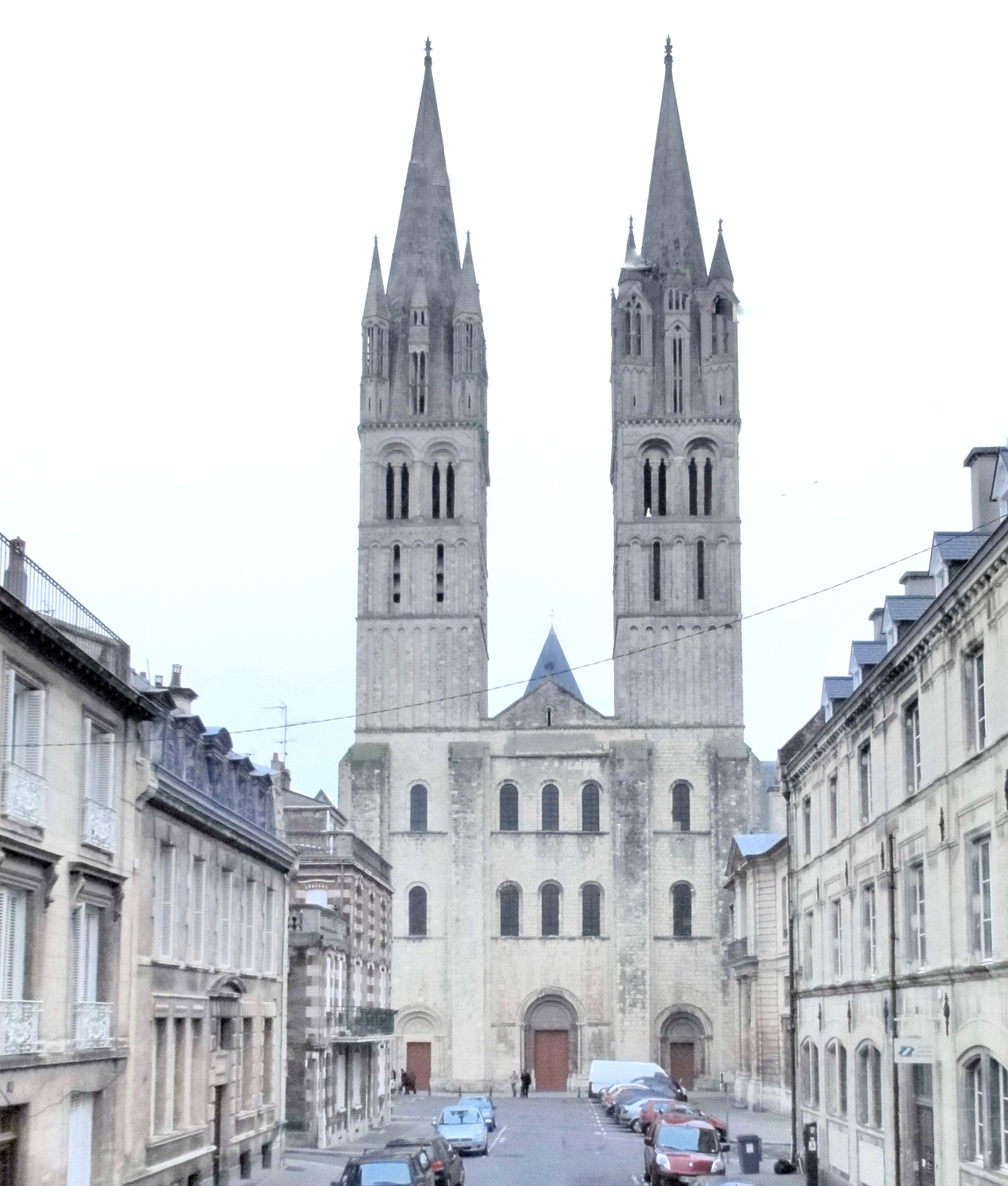 façade occidentale de l'église Saint-Étienne de Caen dans le Calvados (Basse-Normandie, France).